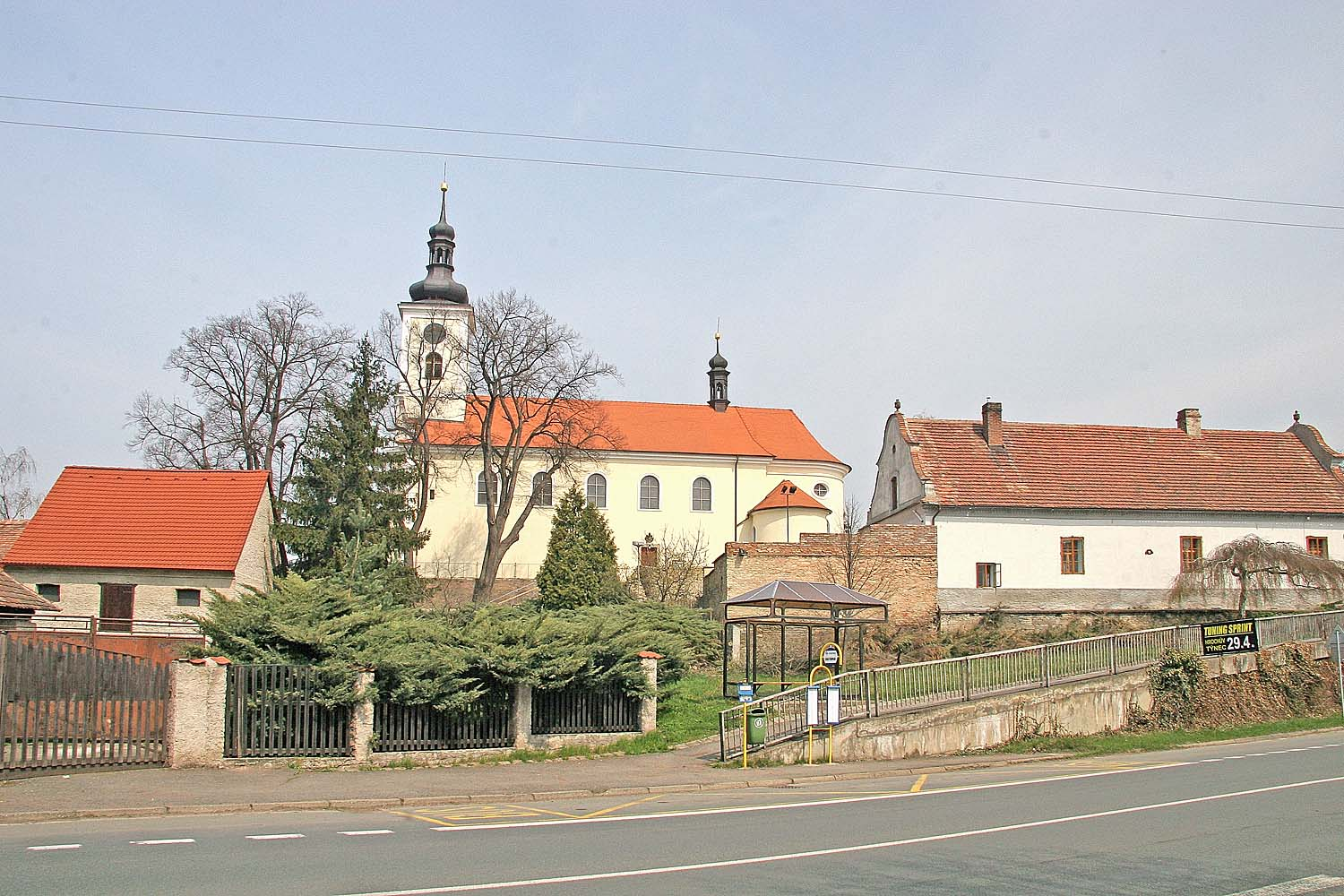 kostel Svatého Martina v Hrochově Týnci, district Chrudim autor: Prazak date: 20. 4. 2006